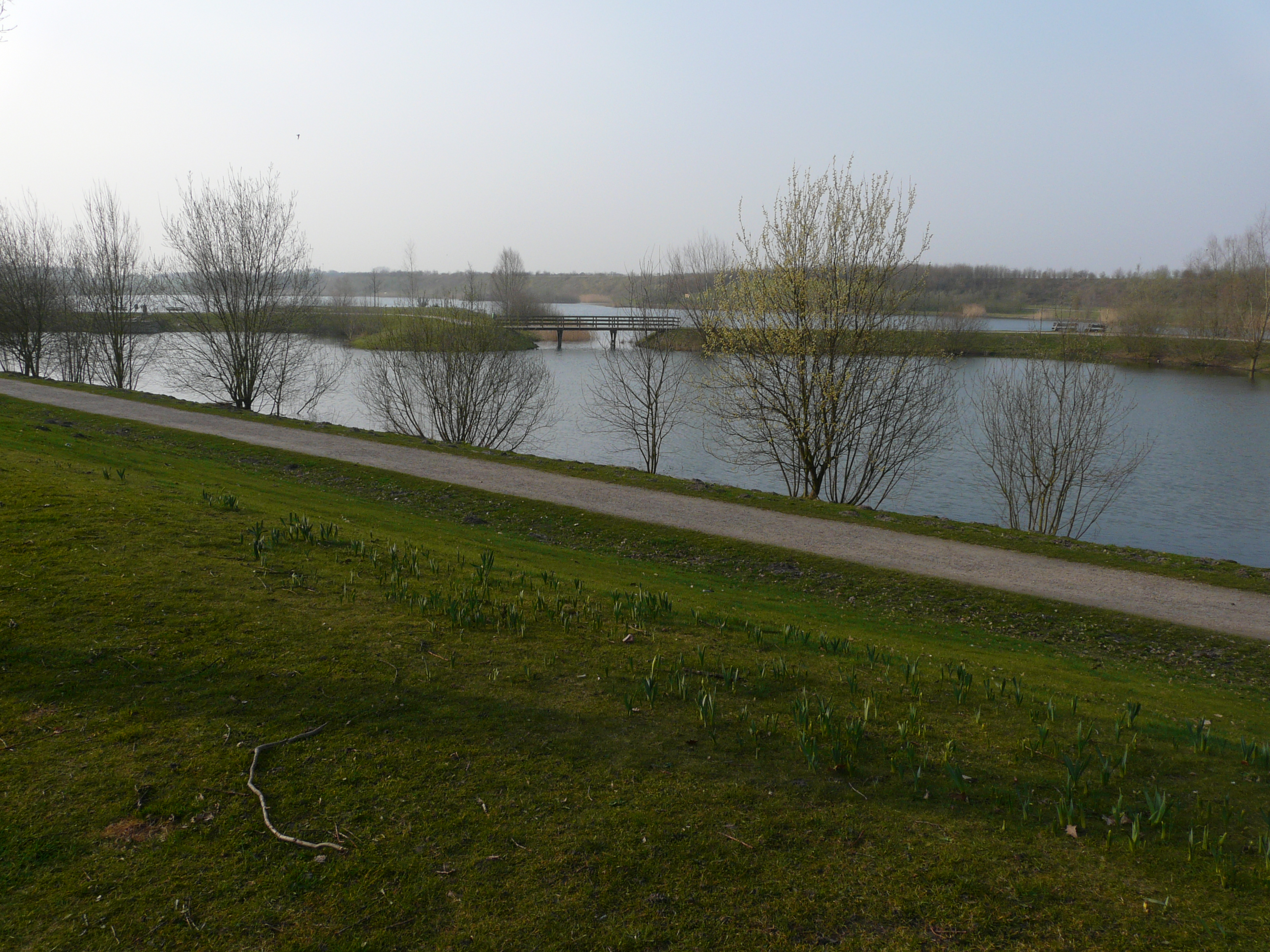 Water aan de Warande, natuurgebied in Gilze